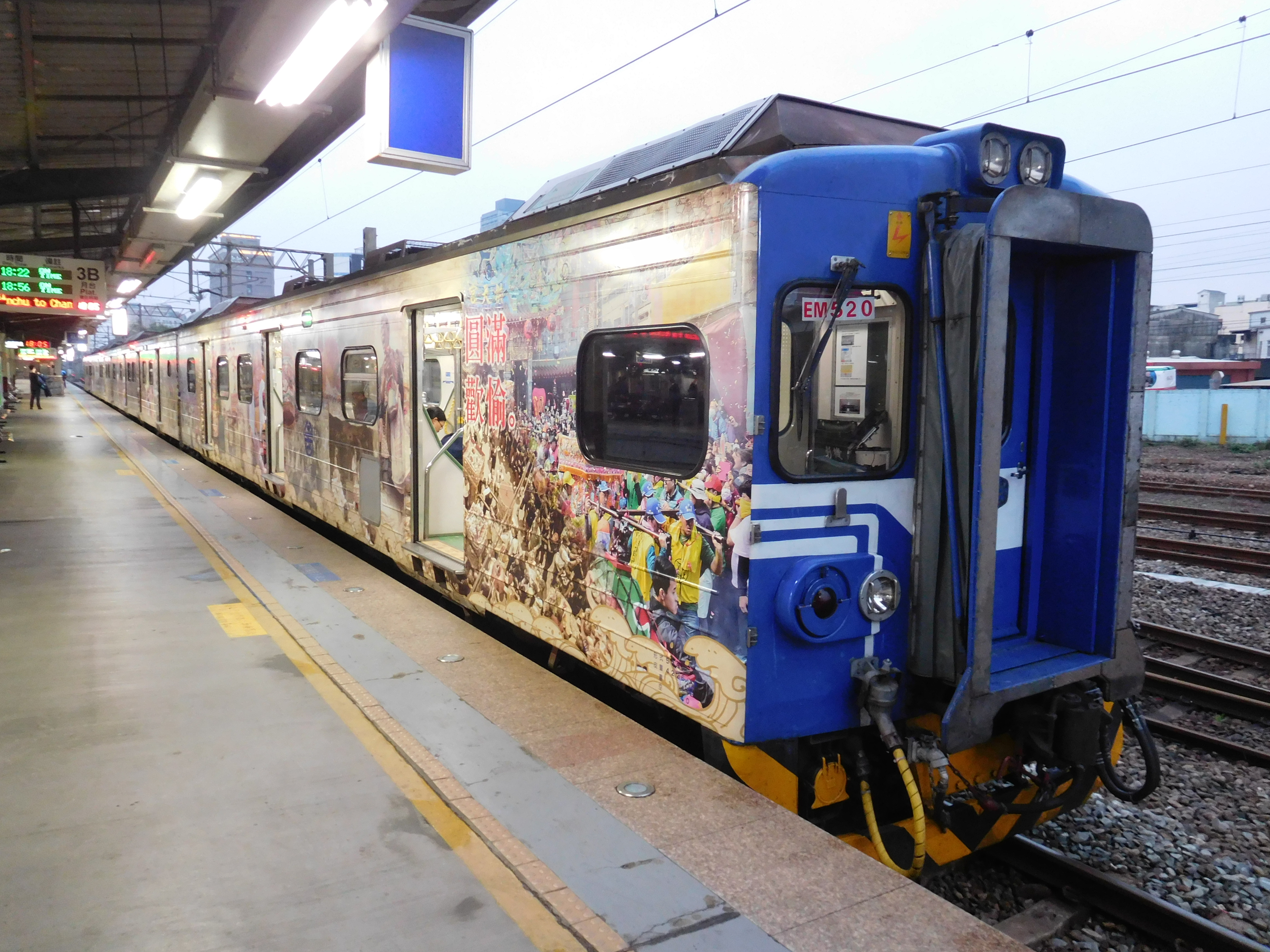 中文（台灣）: 台鐵EMU500白沙屯媽祖彩繪列車